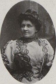 Marie Pštrossová, česká divadelní herečka